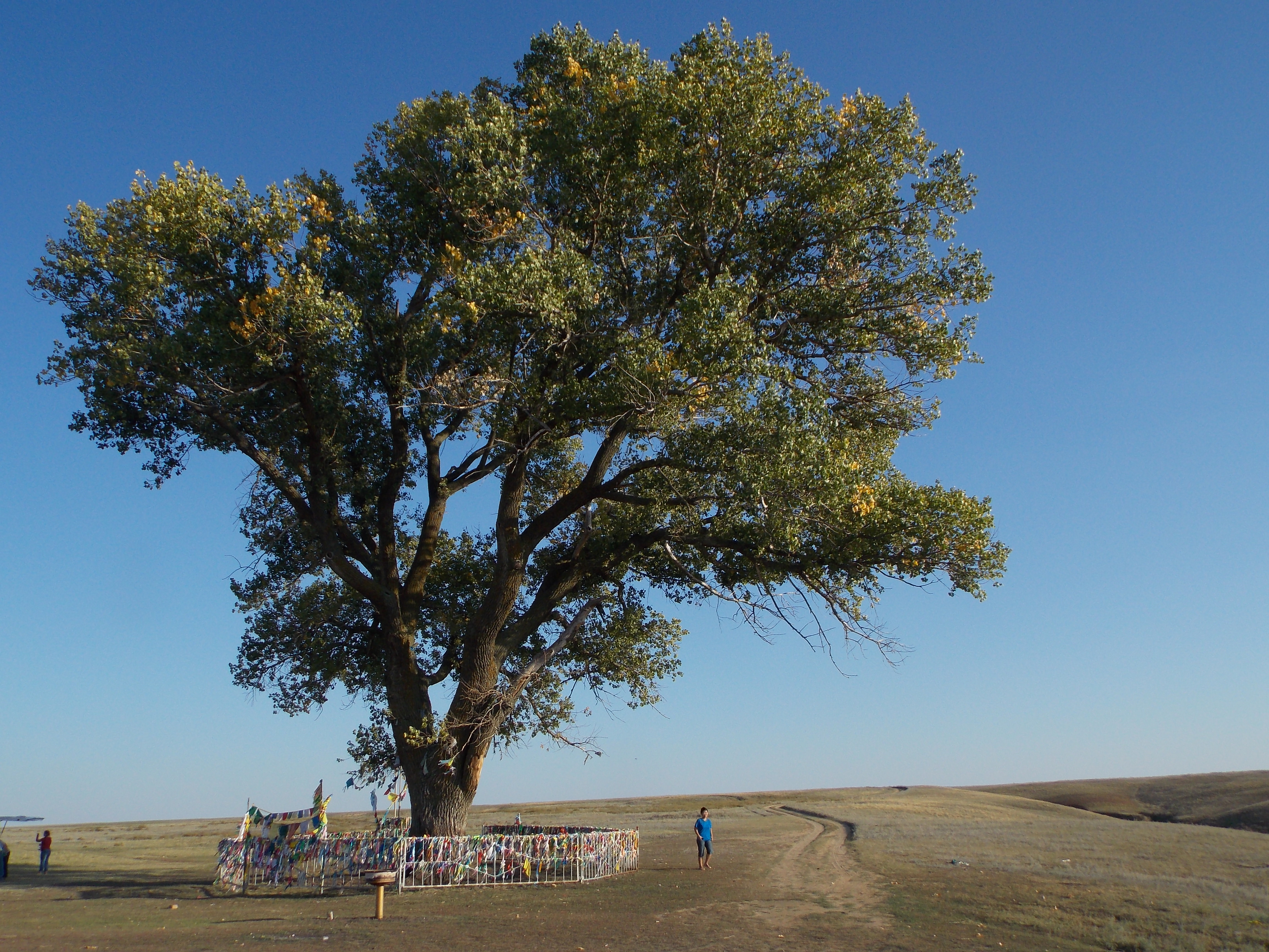 Тополь Пурдаш-багши, Хар-Булук, Калмыкия